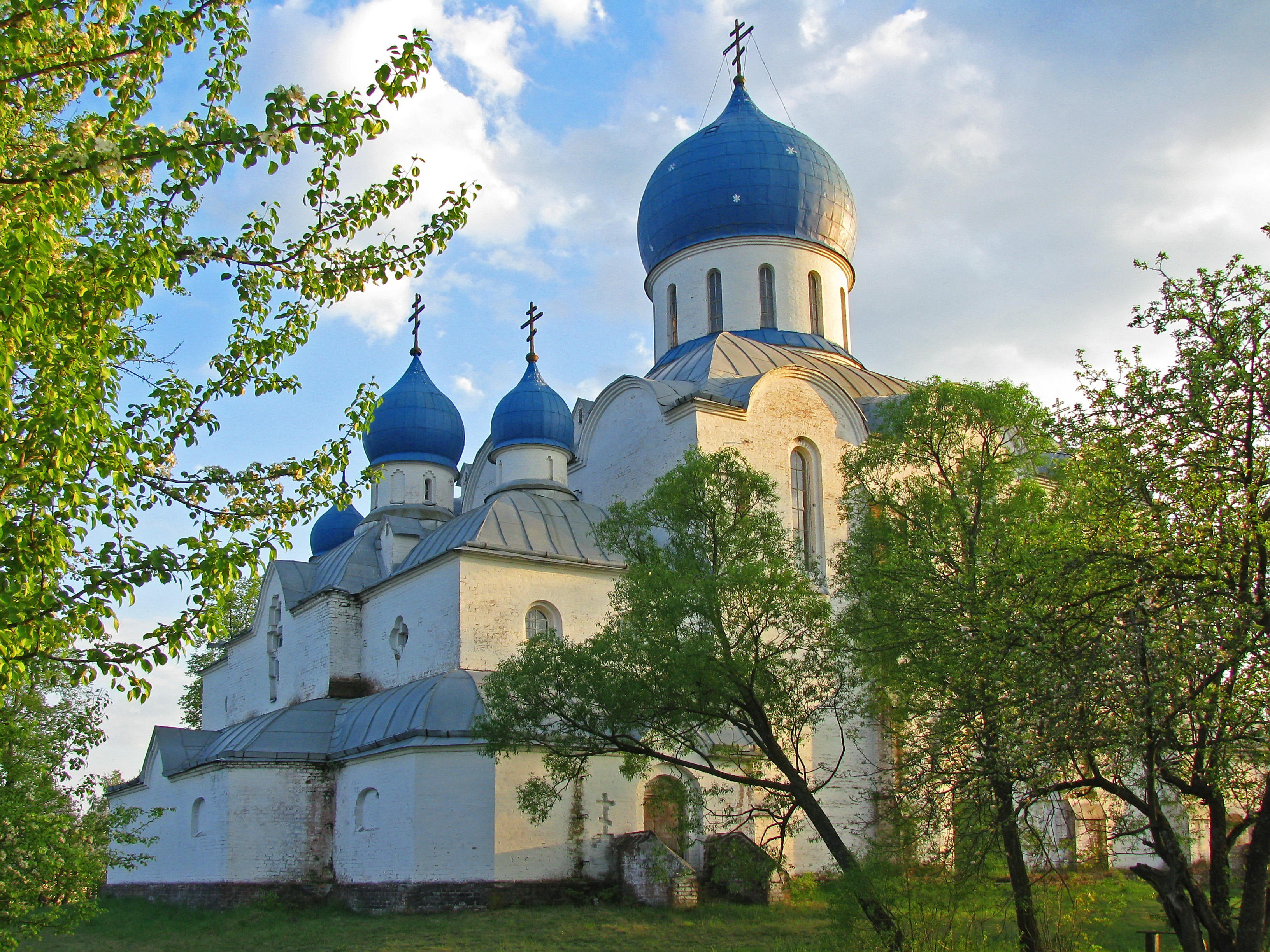 Покровська церква (мур.) с. Жукля